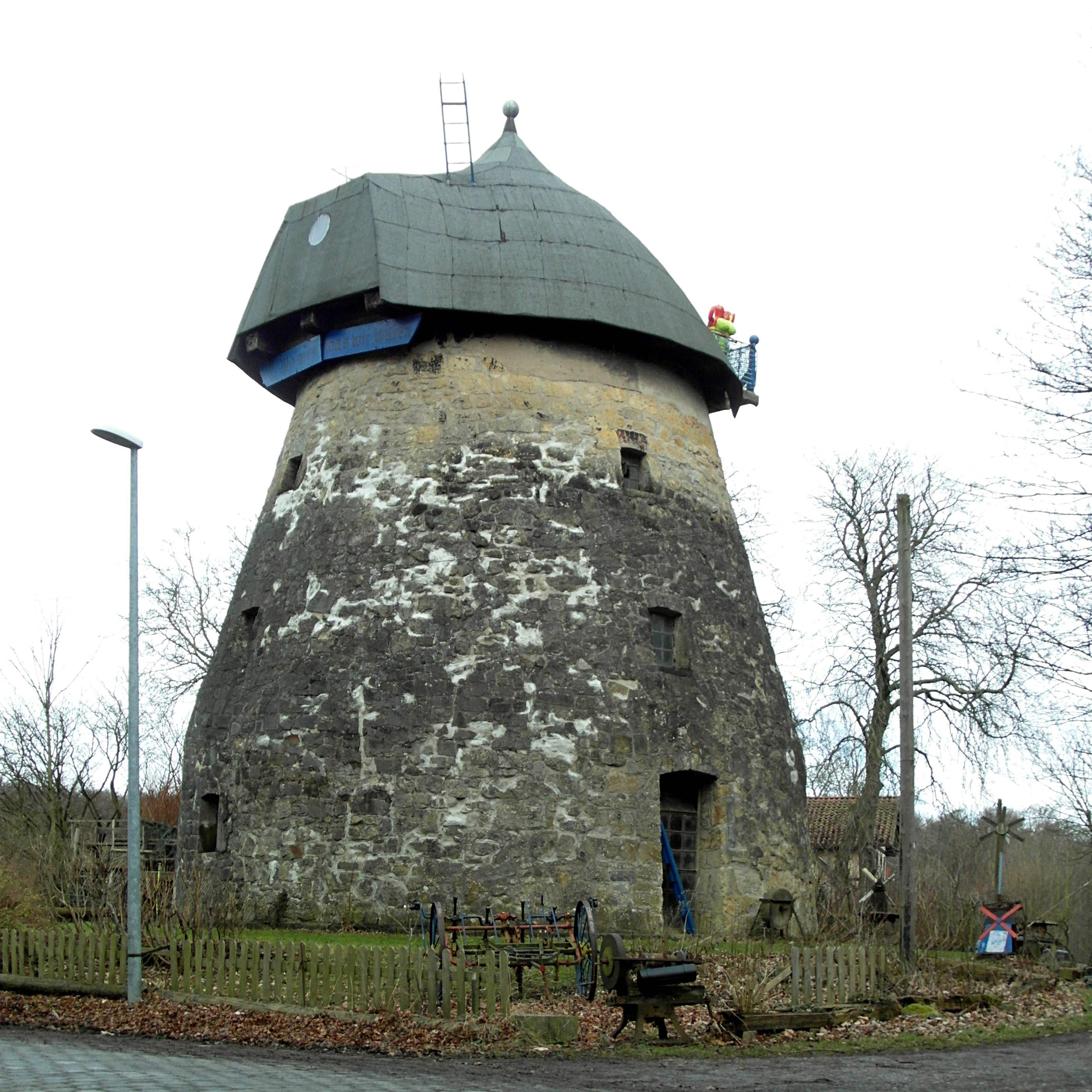 Die Struckmeyersche Mühle auf dem Gehrdener Berg in der Region Hannover in Niedersachsen